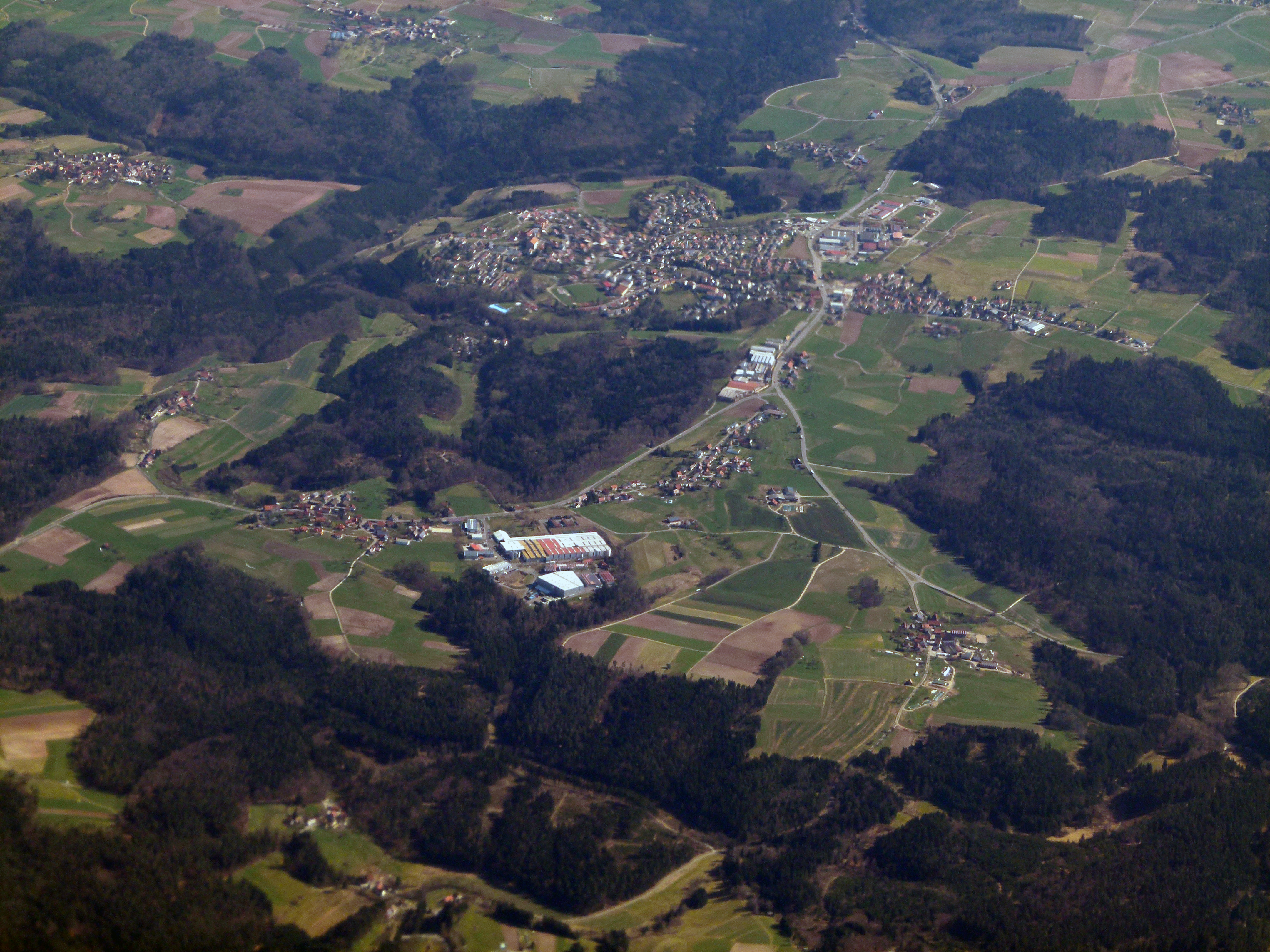 Luftbild von Mainhardt, von Westen